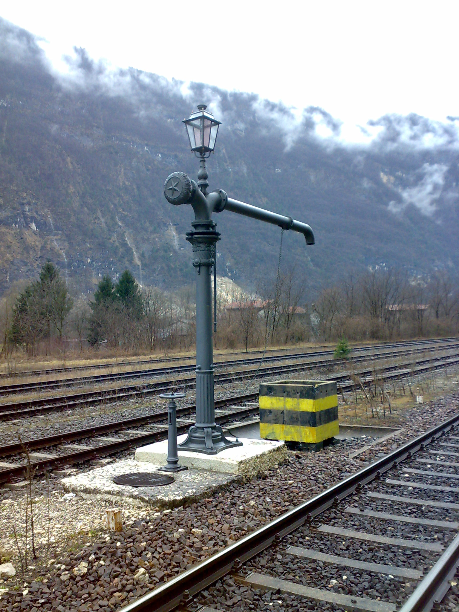 Apparecchiatura utilizzata un tempo per rifornire il serbatoio d'acqua delle Locomotiva a vapore presso la stazione di Primolano